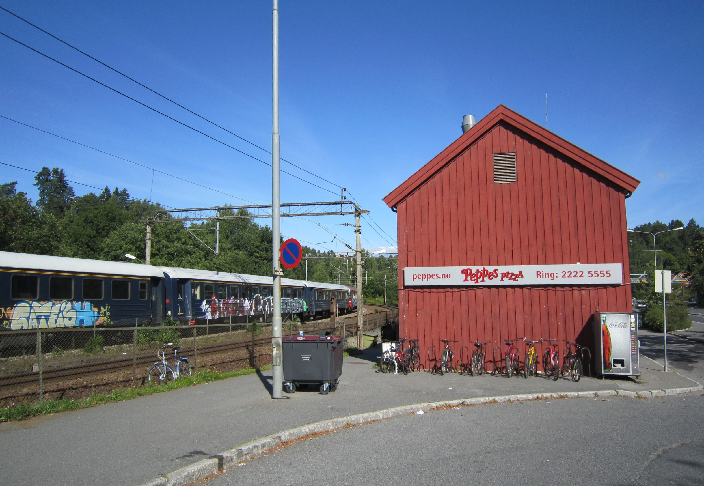 Hauketo stasjon, Oslo